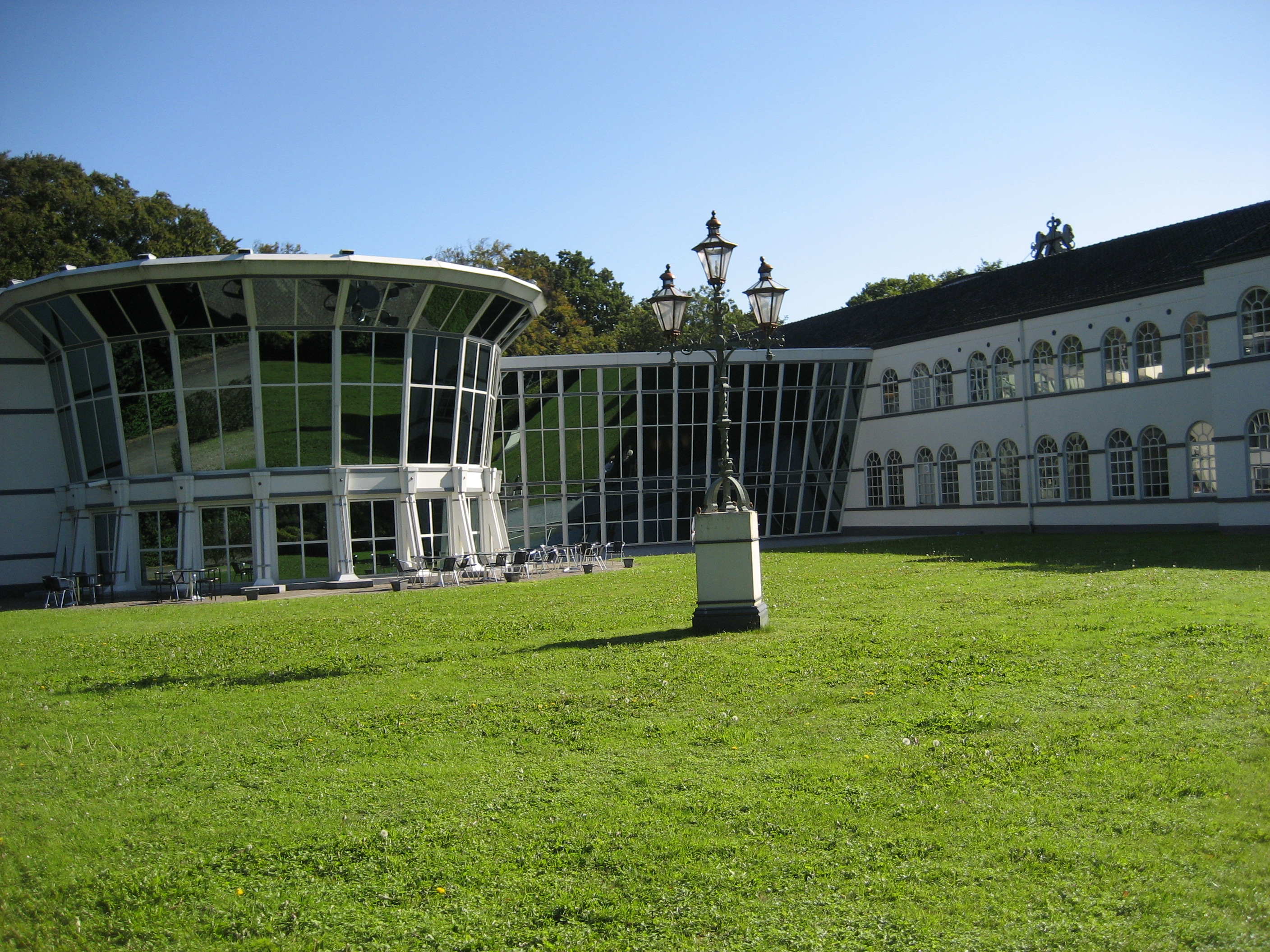 De achterzijde van de Zilverfabriek met de nieuwbouw. Voor de voorzijde van het gebouw zie thumb|left